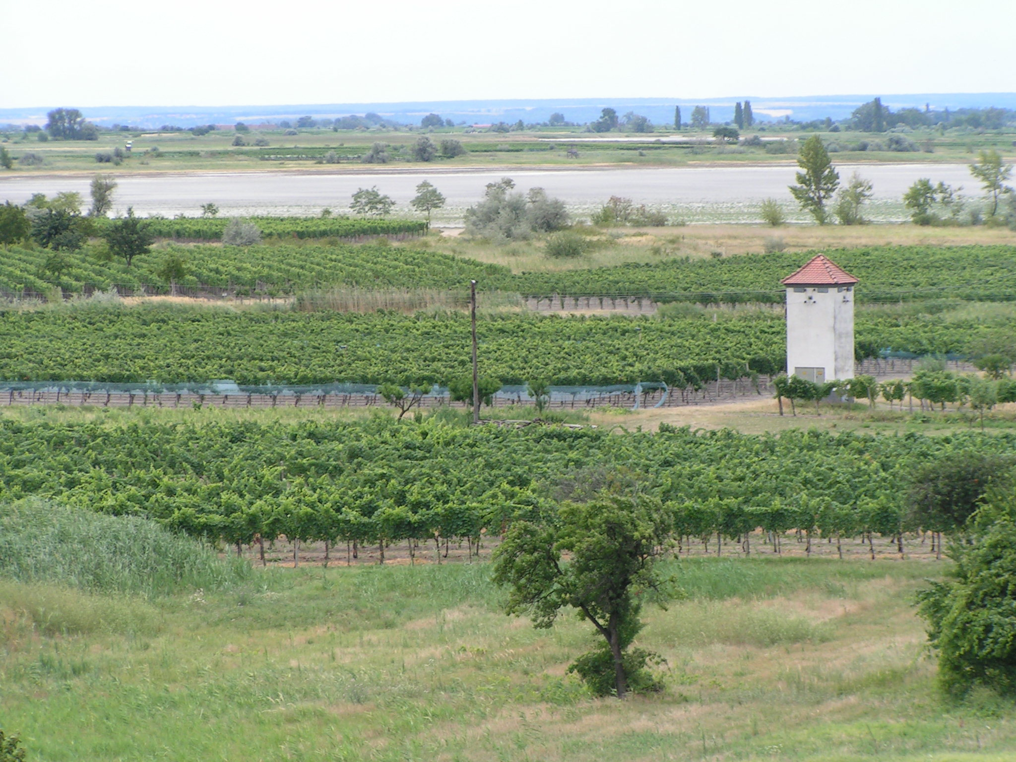 Blick auf die "Hölle" und den Stinkersee bei Illmitz